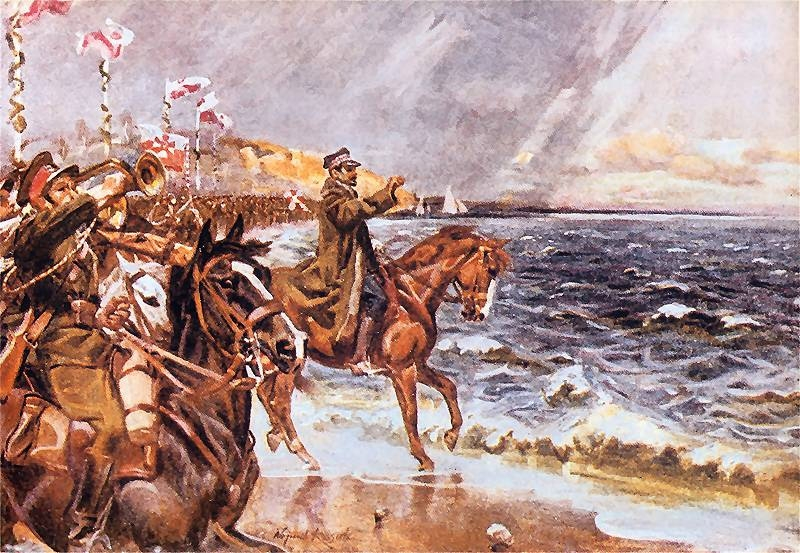 Józef Haller rzuca pierścień w fale Bałtyku 10 lutego 1920 r.